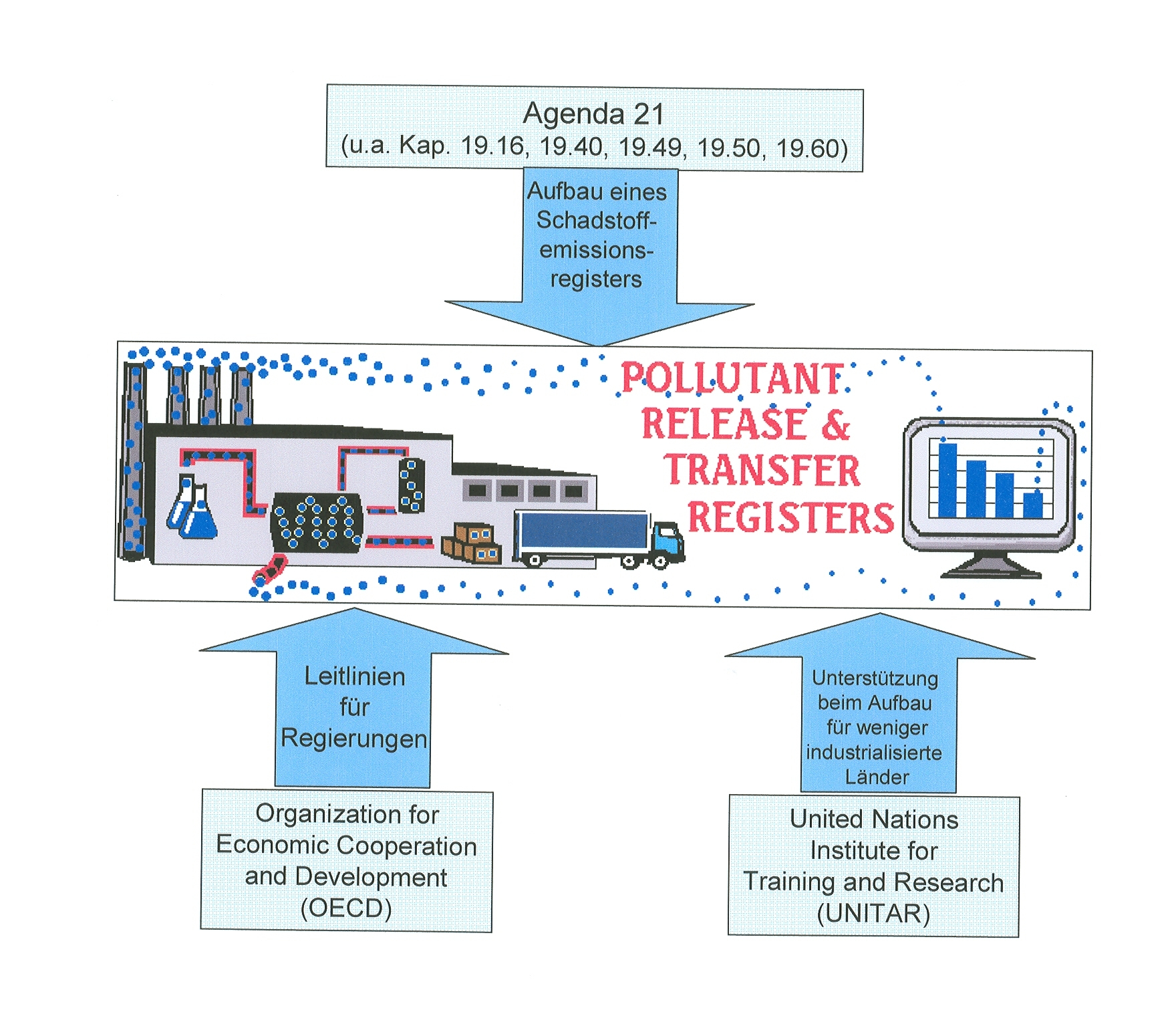 Schadstoffemissionsregister (Auftrag und Unterstützung) (eigenes Bild; März 2005; Lizenz: GNU-FDL)